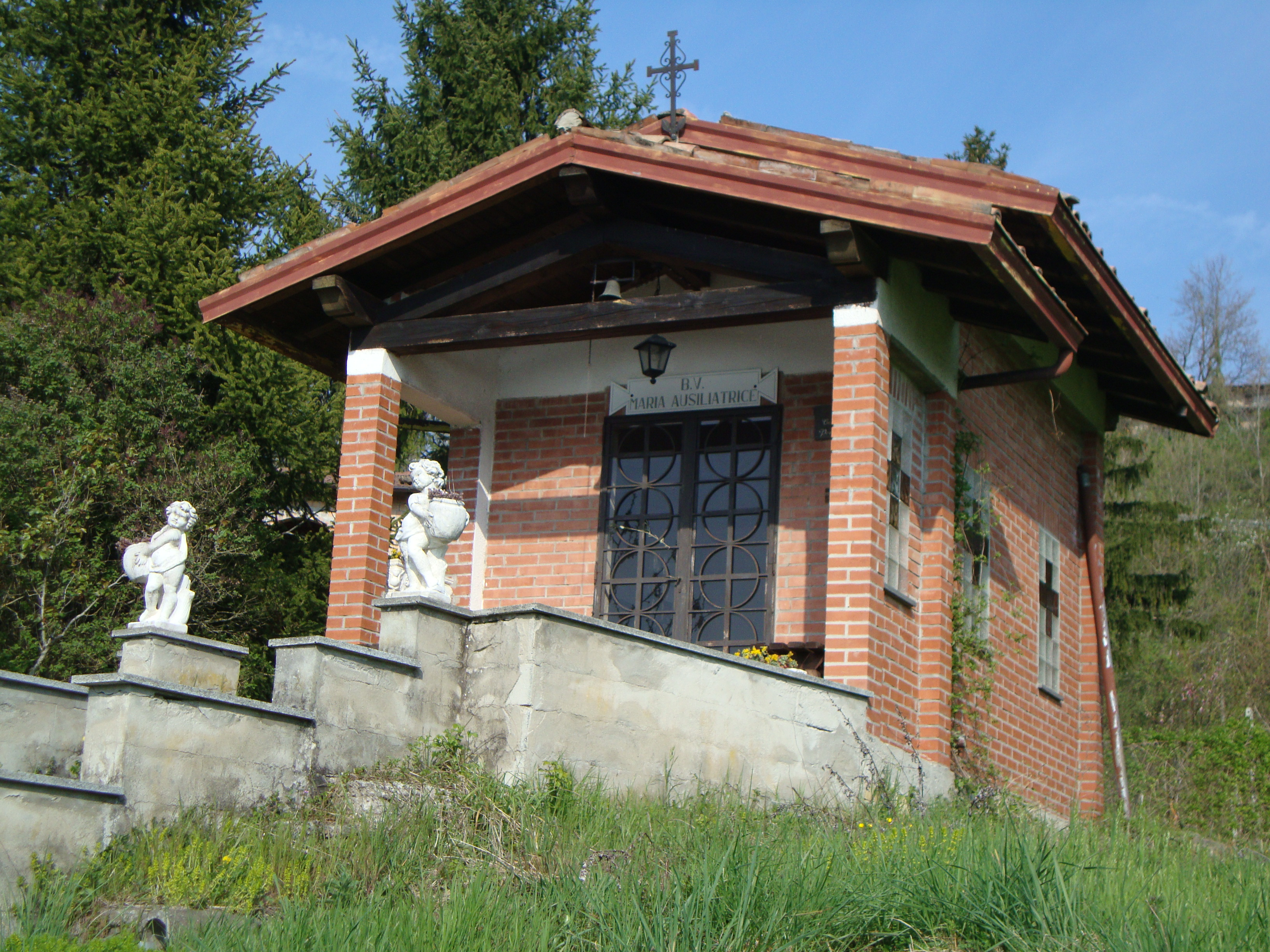 Mistadello Madonna Immacolata Mezzacosta Vernasca